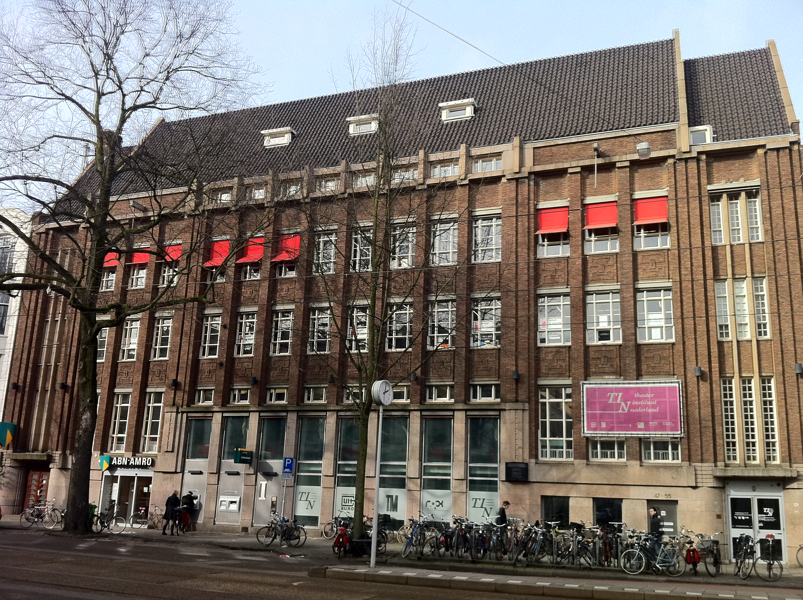 Amsterdam - Lippman-Rosenthal bank, Sarphatistraat. Amsterdamsche Bank